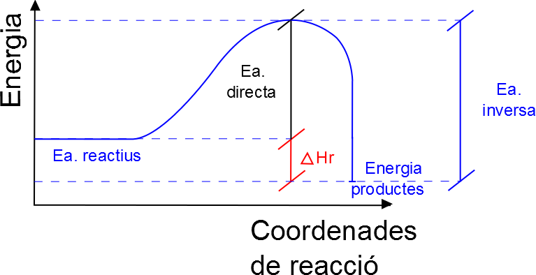 Gràfic de l'energia en funció de les coordenades de reacció, en una reacció química exotèrmica.